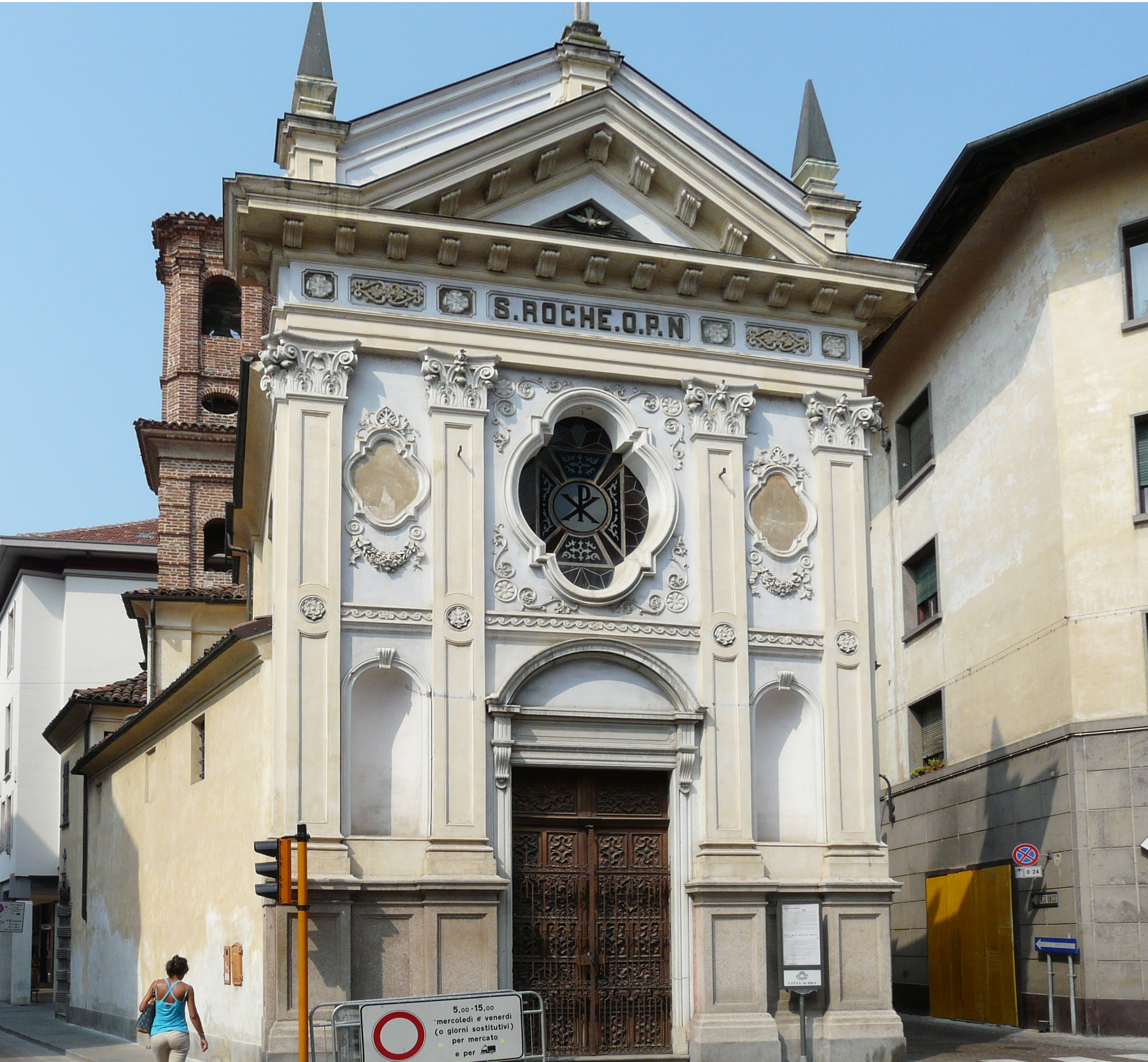 Chiesa di San Rocco, Bra, Piemonte, Italia